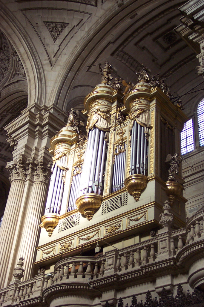 Órgano de la Catedral de la Asunción de Jaén